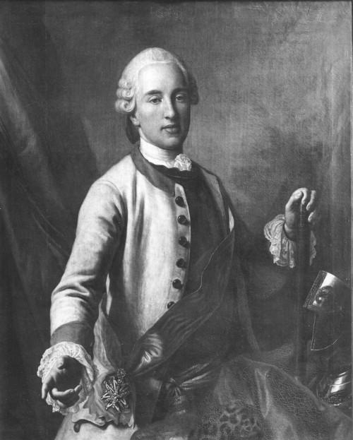 Franz Xaver von Sachsen (1730-1806), Kuradministrator von Sachsen als Generalleutnant